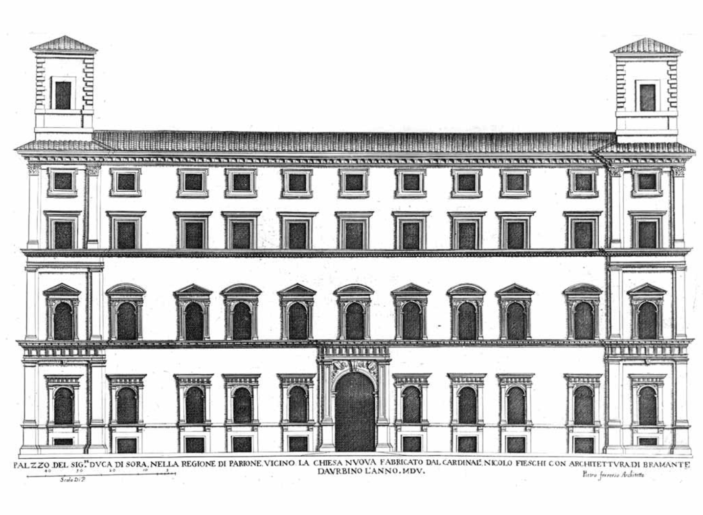 Palazzo del Signore Duca di Sora nella Regione di Parione